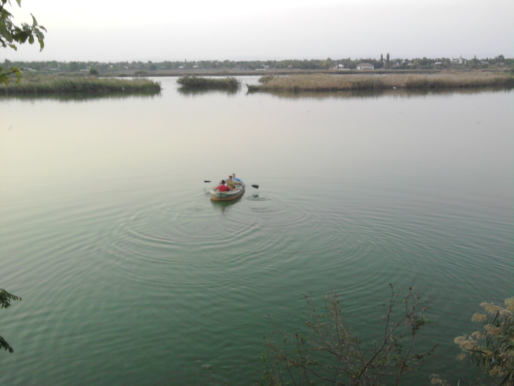 Lacul care separa cele doua sate din comuna Fulga